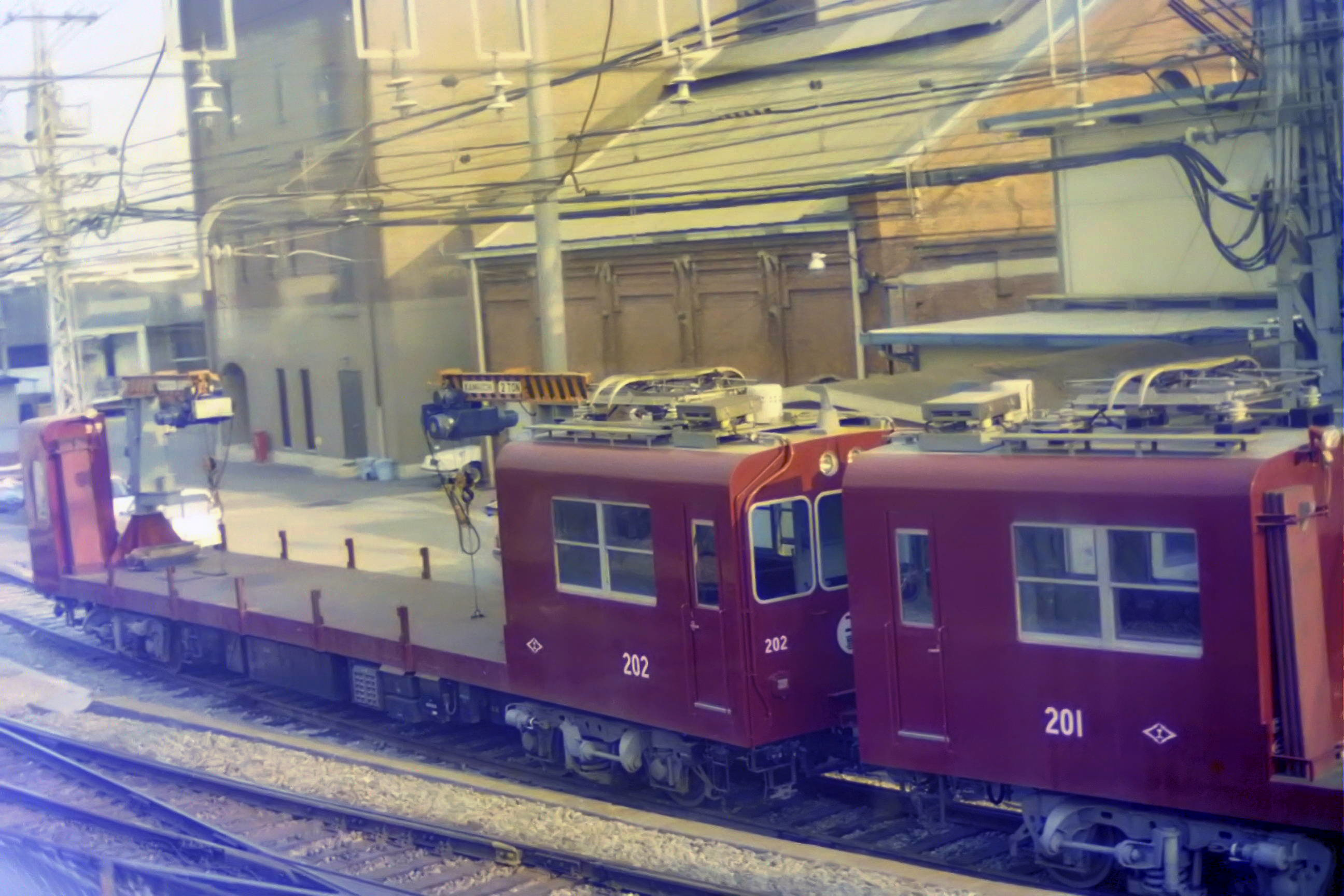 阪神電気鉄道 202形（機器換装、塗装変更前）